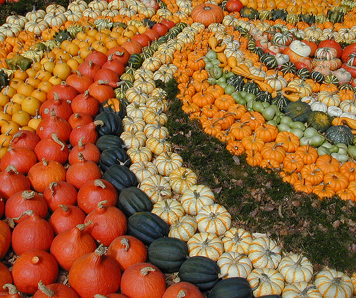 Kürbisausstellung bei Zürich 2003